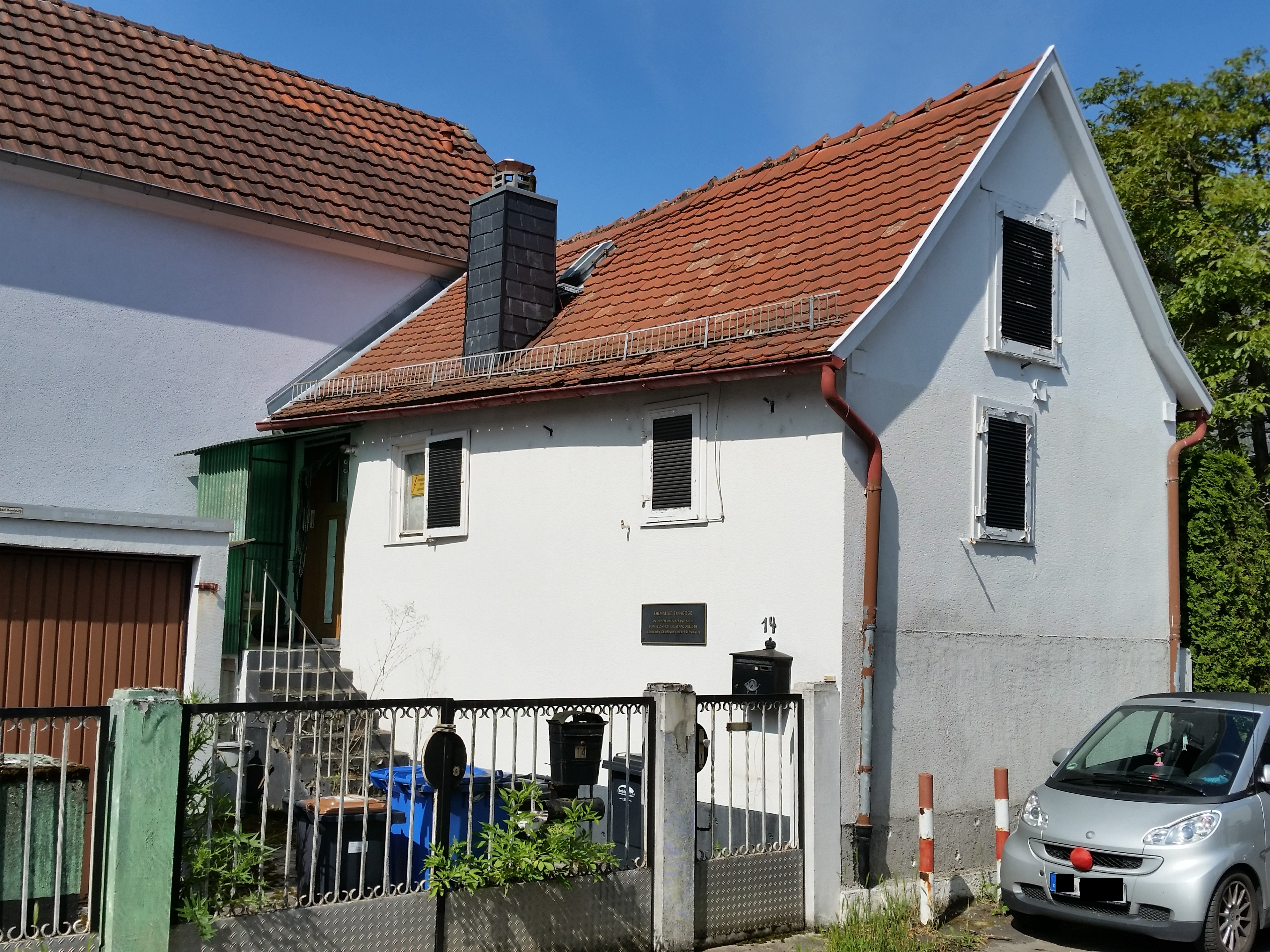 Dieses Gebäude in der Bornstrasse 14 war von ca 1855 bis ca 1920 eine Synagoge in Ober-Erlenbach (jetzt Stadtteil von Bad Homburg). Kulturdenkmal